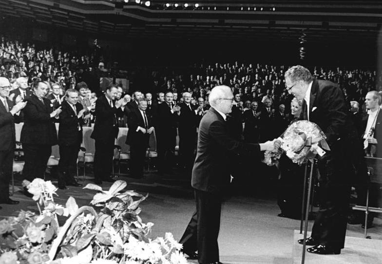 ADN-ZB Mittelstädt 23.10.87 Berlin: Jubiläum-Staatsakt. Mit einem Staatsakt der Deutschen Demokratischen Republik im Palast der Republik fanden die Feierlichkeiten zum 750jährigen Jubiläum Berlins ihren Höhepunkt. Nach dem Erklingen von Ludwig van Beethovens 9. Sinfonie bedankte sich der Generalsekretär des ZK der SED und Vorsitzende des Staatsrates der DDR, Erich Honecker, beim Dirigenten Prof. Kurt Sanderling.